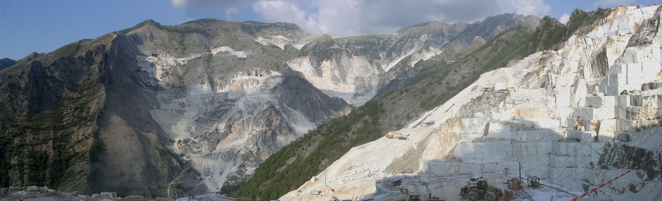 Panoramica delle cave di marmo a Carrara